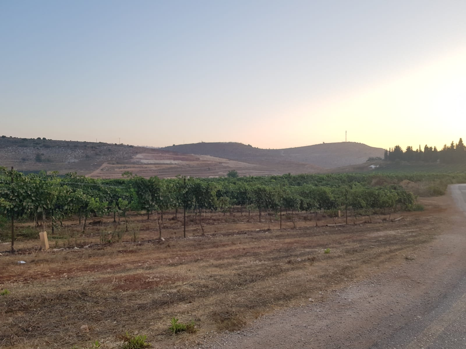 כרמי החקלאים ביישוב